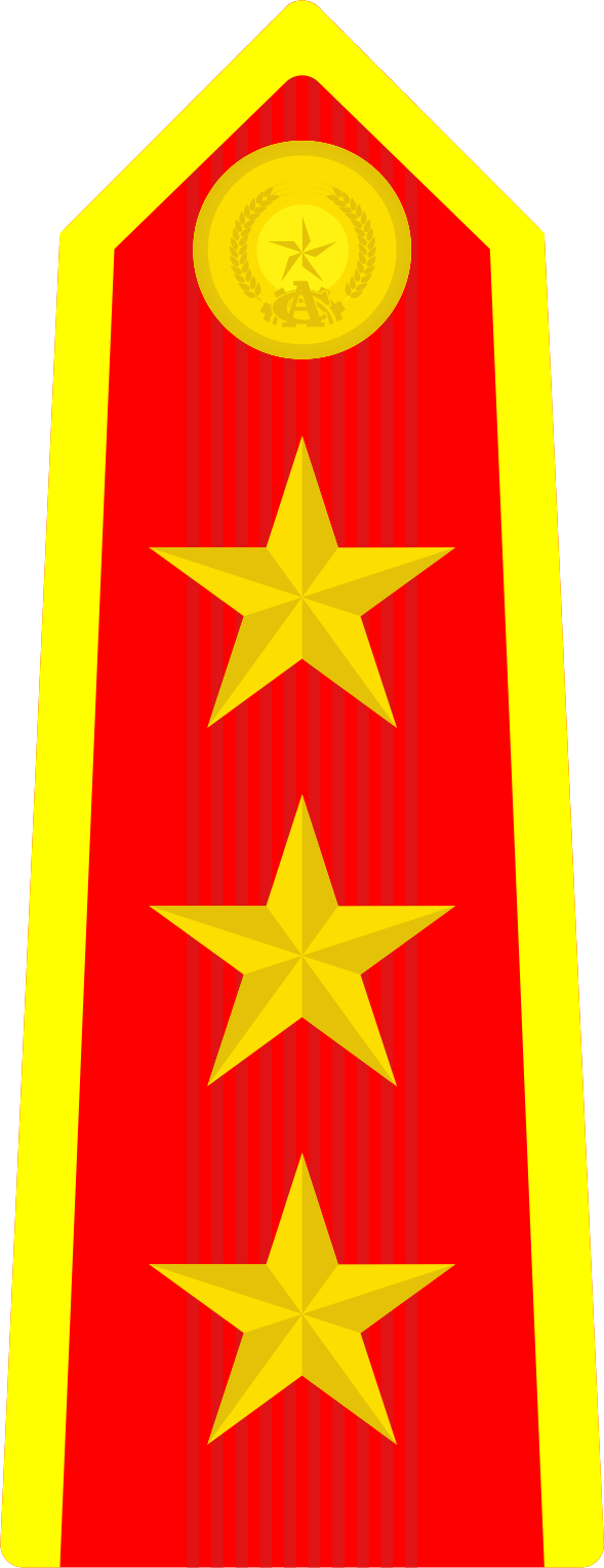 Cấp hiệu Thượng tướng Công an